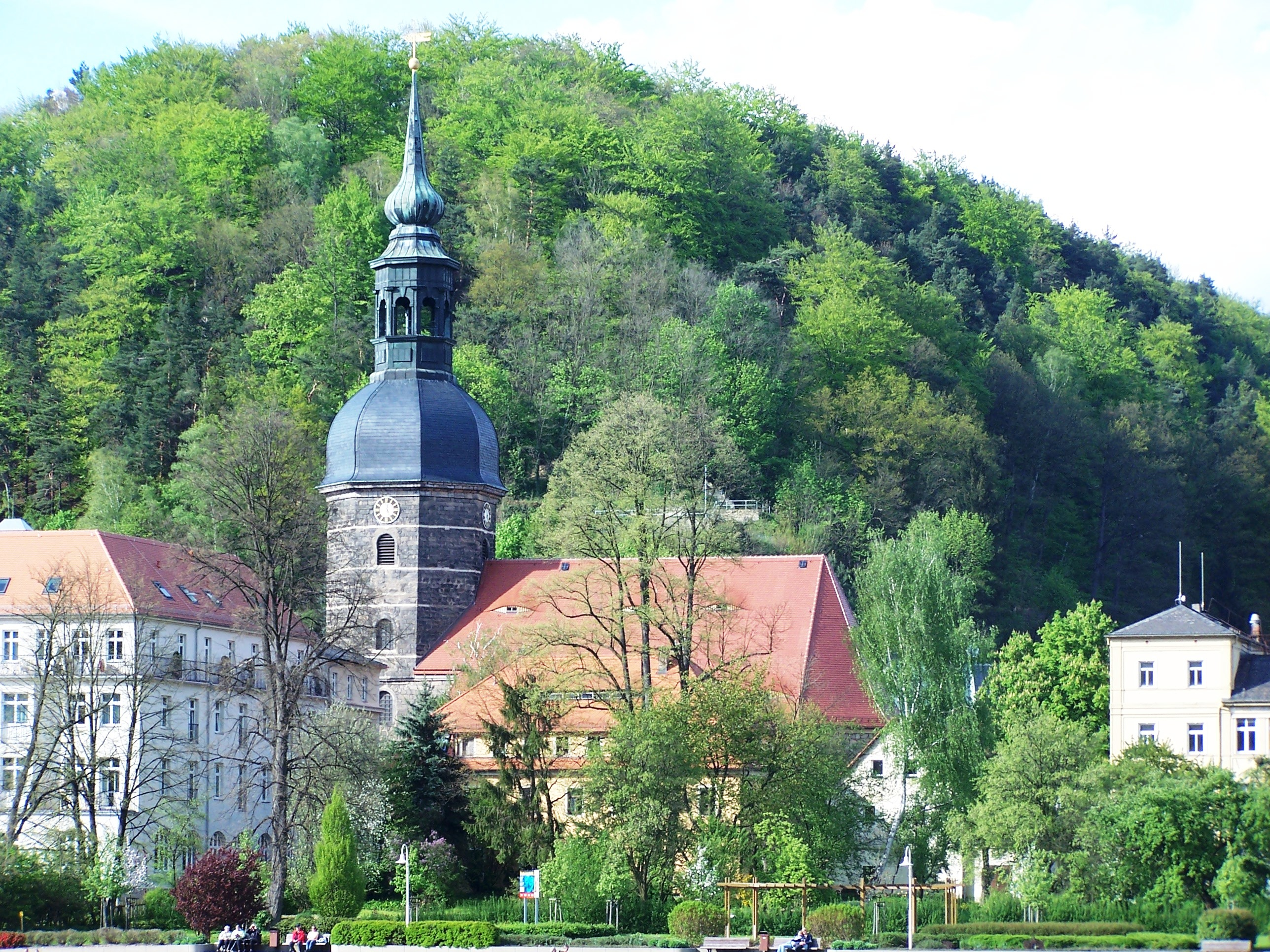 Johanniskirche in Bad Schandau, Sächsische Schweiz